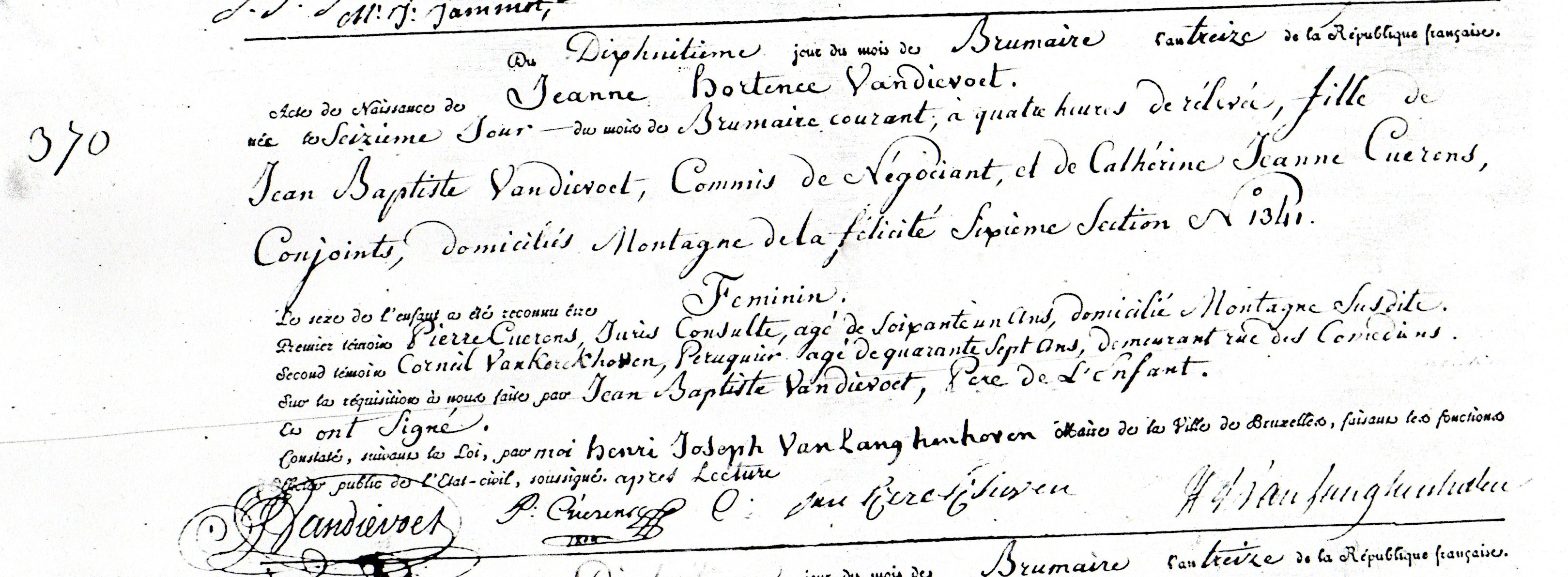 Bruxelles, acte de naissance de Hortense Van Dievoet, née à Bruxelles le 16 Brumaire de l'an XIII (7 novembre 1804), qui épousera à Bruxelles le peintre Ignace Brice. ACTE DE NAISSANCE À BRUXELLES LE 16 BRUMAIRE AN XIII (7 novembre 1804) "370 Du Dixhuitième jour du mois de Brumaire l’an treize de la République française. Acte de Naissance de Jeanne Hortence Van dievoet. Née le Seizième Jour du mois de Brumaire courant, à quatre heures de rélevée, fille de Jean Baptiste Van dievoet, Commis de Négociant, et de Cathérine Jeanne Cuerens, Conjoints, domiciliés Montagne de la félicité Sixième Section N° 1341. Le sexe de l’enfant a été reconnu être Feminin. Premier témoin Pierre Cuerens, Juris Consulte, agé de soixante un ans, domicilié Montagne Susdite. Second témoin Corneil Vankerckhoven, Peruquier agé de quarante sept ans, demeurant rue des Comediens. Sur la réquisition à nous faite par Jean Baptiste Van dievoet, Pere de l’Enfant. Et ont Signé. Constaté, suivant la loi, par moi Henri Joseph Van Langhenhoven Maire de la Ville de Bruxelles, faisant les fonctions d’Officier public de l’Etat-civil, soussigné après Lecture"